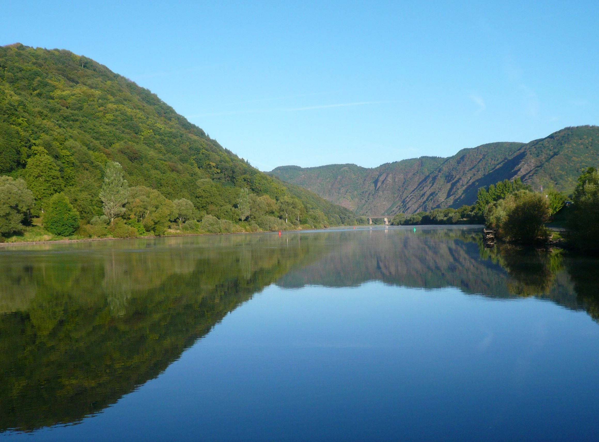 Moselpromenade Ediger-Eller, Blick moselaufwärts zum Calmont